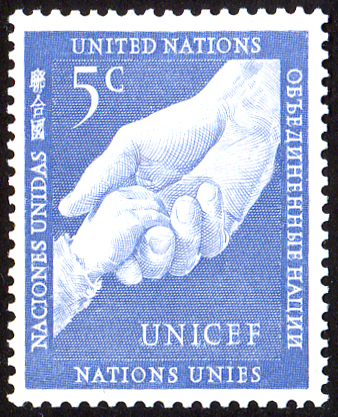 Беларуская (тарашкевіца): Марка ААН «UNICEF»